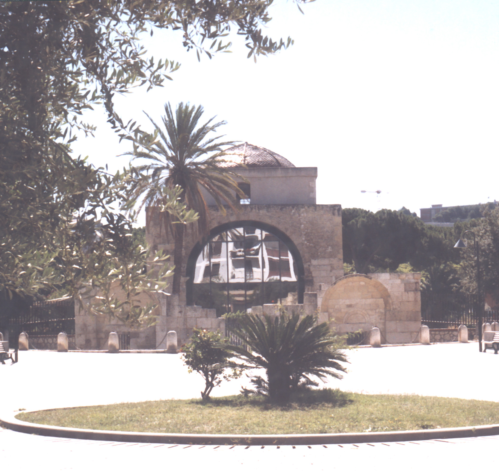 Basilica di San Saturnino (V secolo) - Cagliari